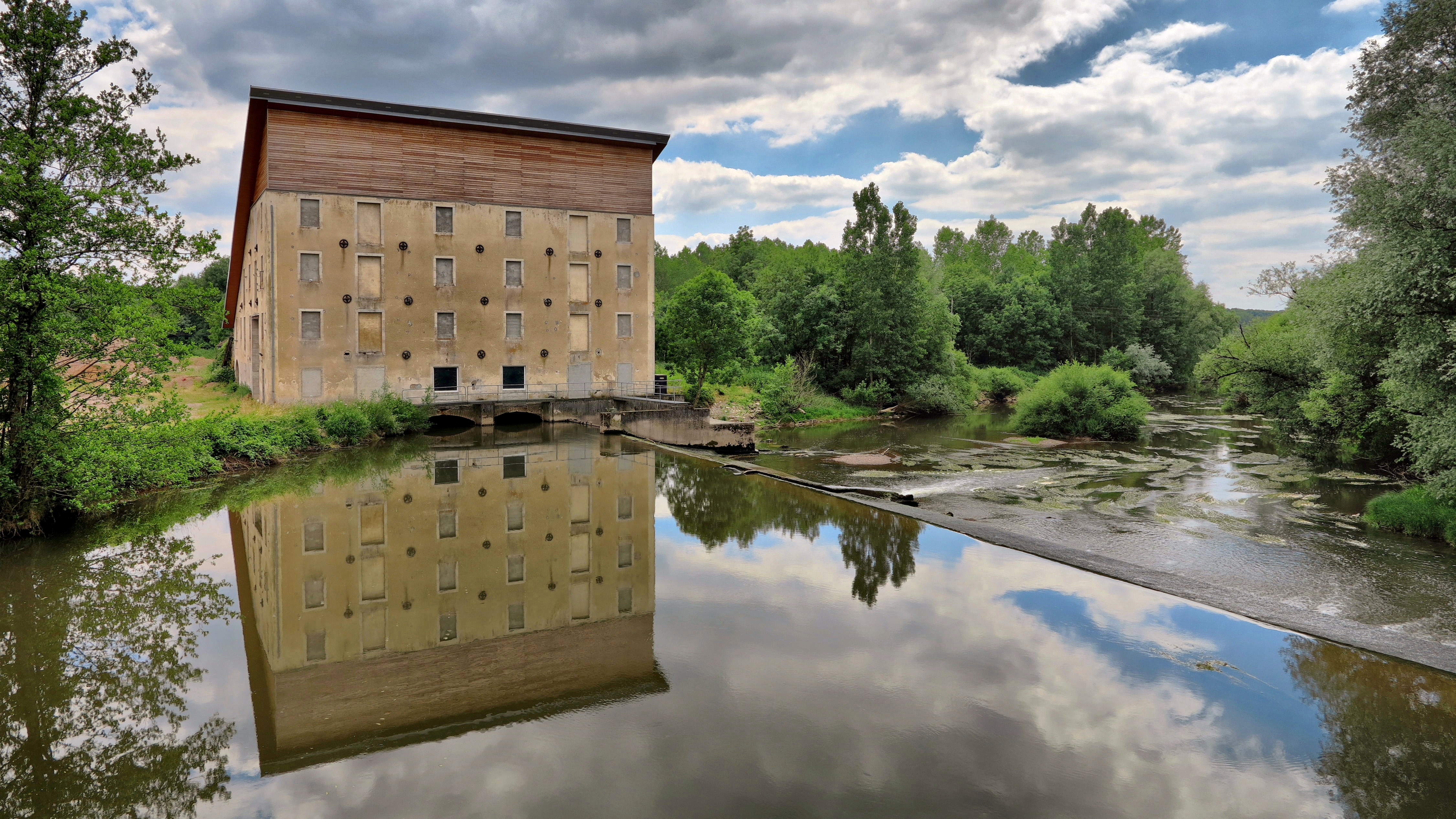 Le moulin sur barrage sur l'Ognon